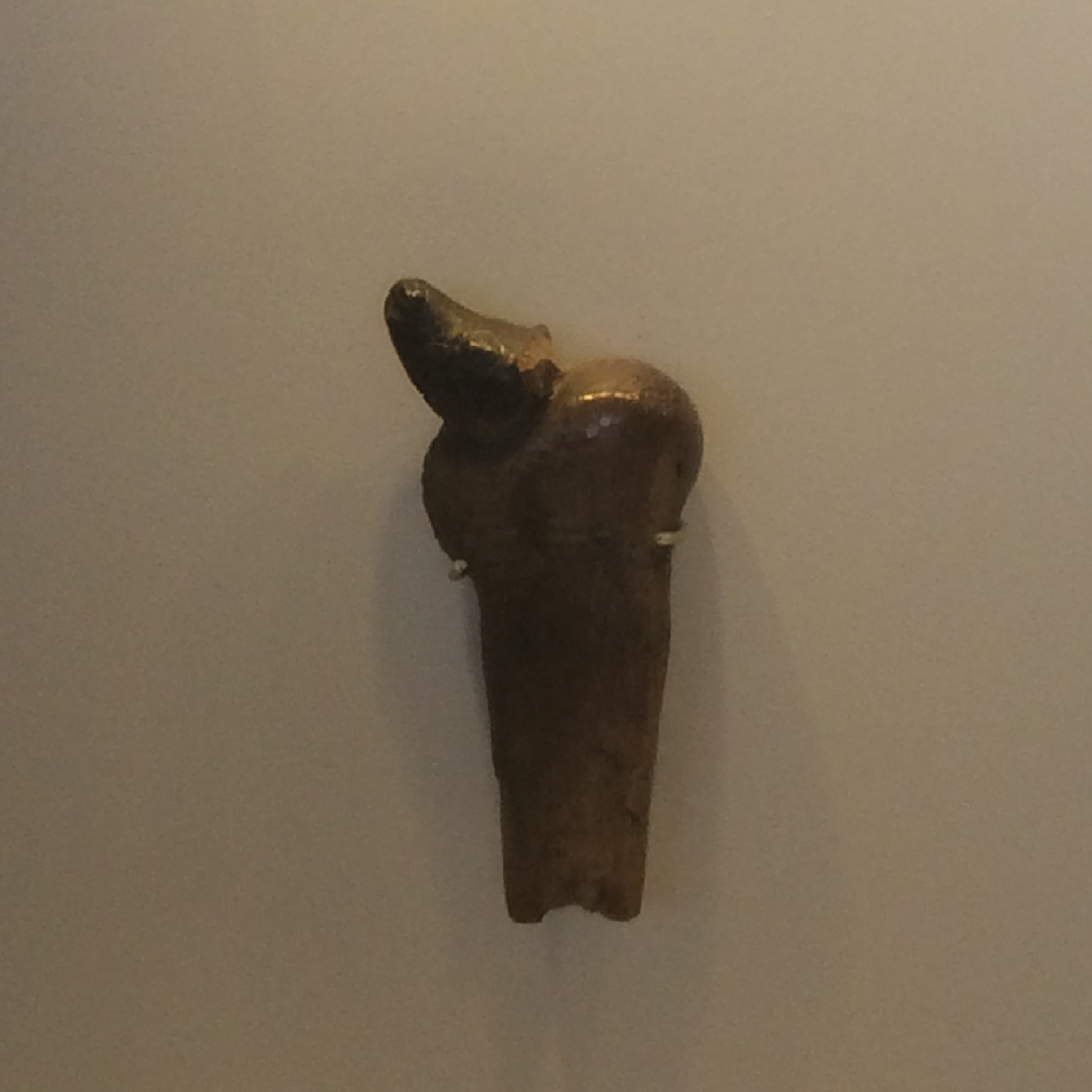 satuette animale période natoufienne, Musée d'Israël